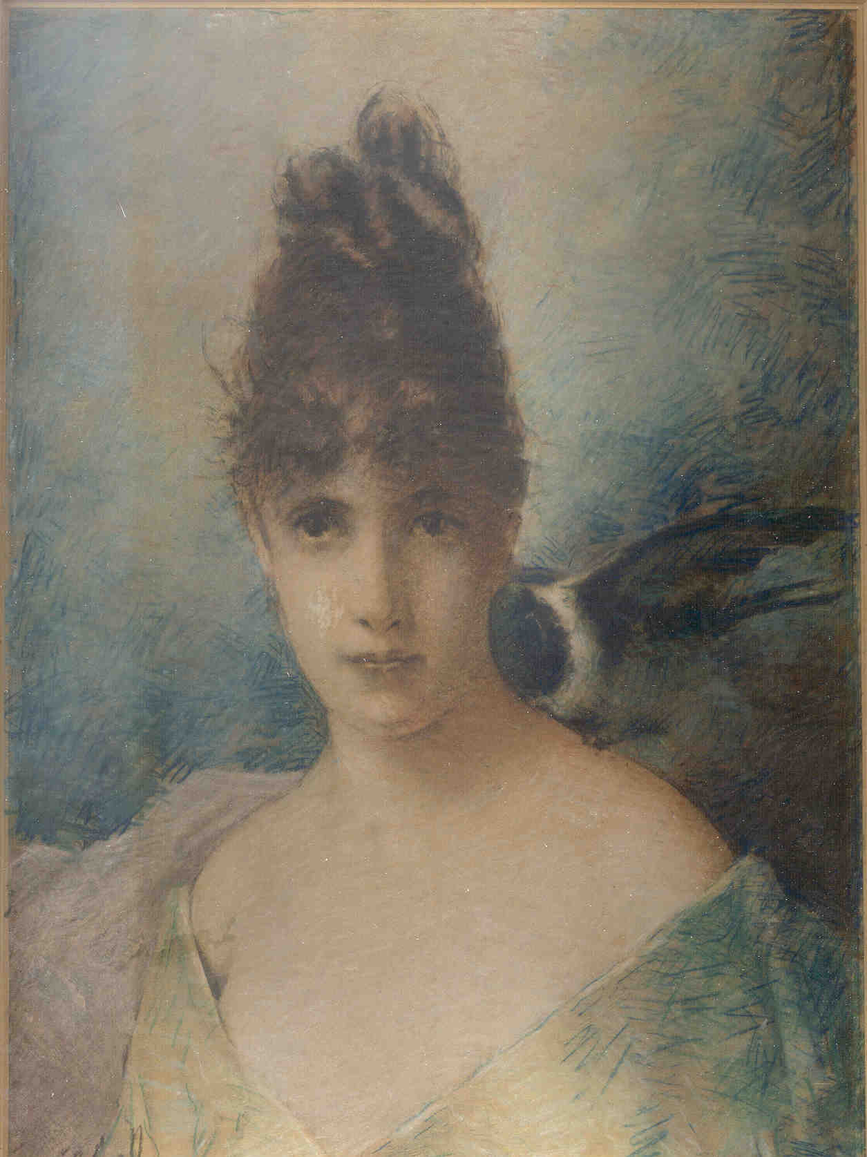 Portrait de jeune fille avec une pie, dessin au crayon de couleur (22cm/28cm), par le peintre belge Eugène Smits (1826-1912)